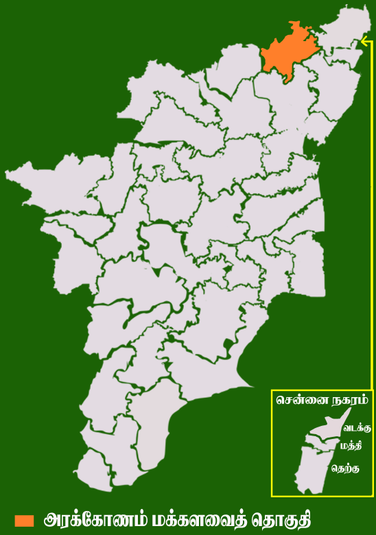 தமிழக வரைபடத்தில் உள்ள அரக்கோணம் மக்களவைத் தொகுதி